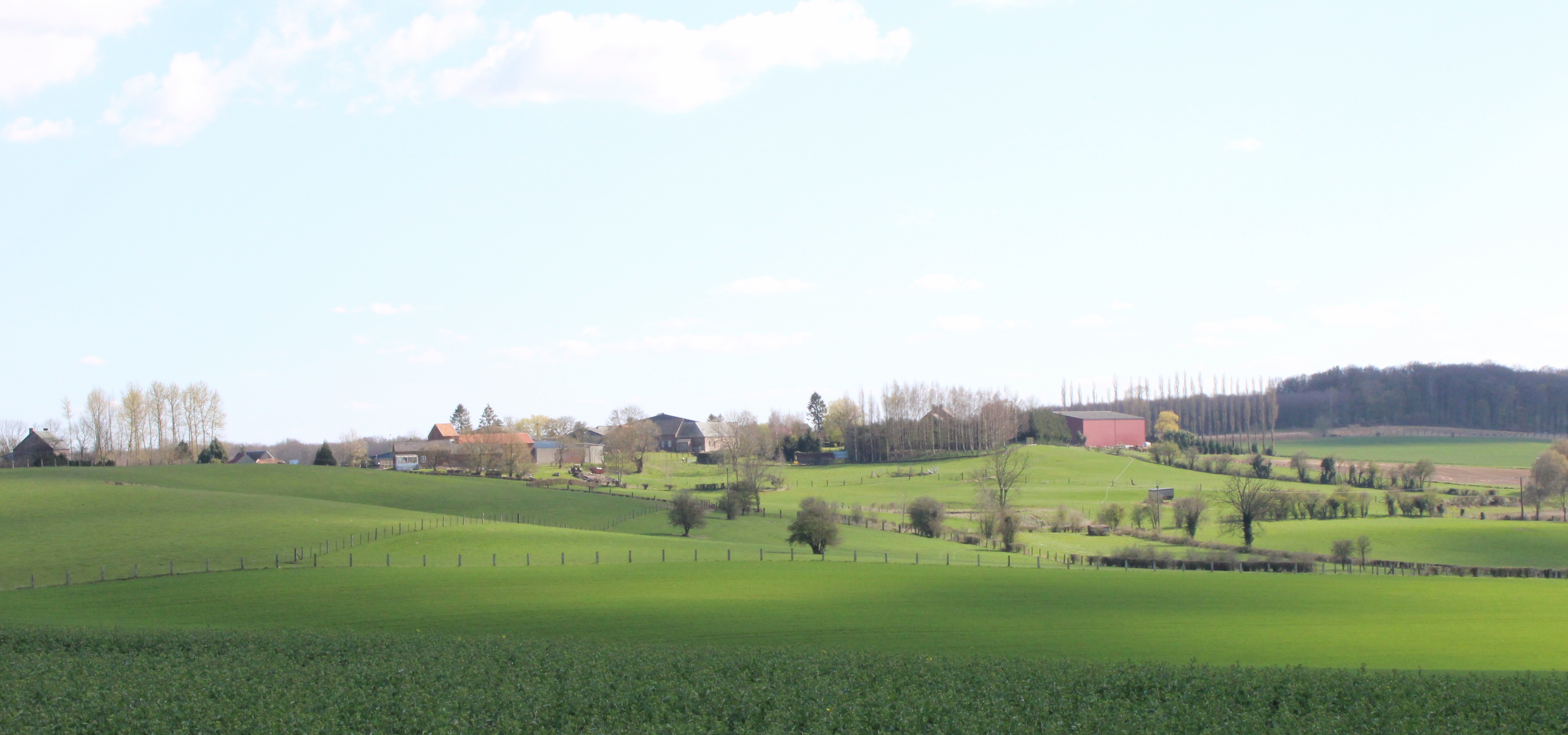 Panorama du village.